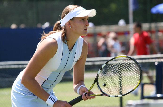 Nadeschda Wiktorowna Petrowa bei den Ordina Open 2005